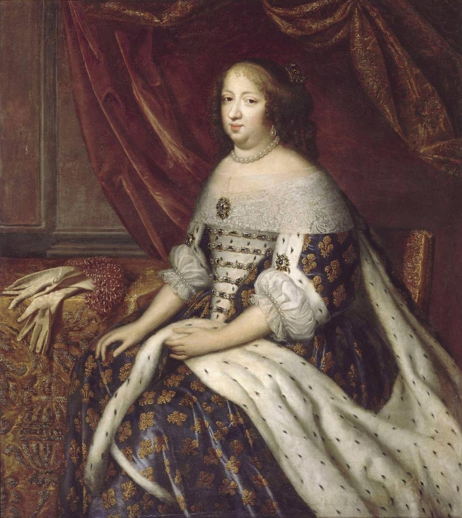 Anne d'Autriche représentée en grand costume royal, assise prés d'une table portant ses gants (1601-1666)